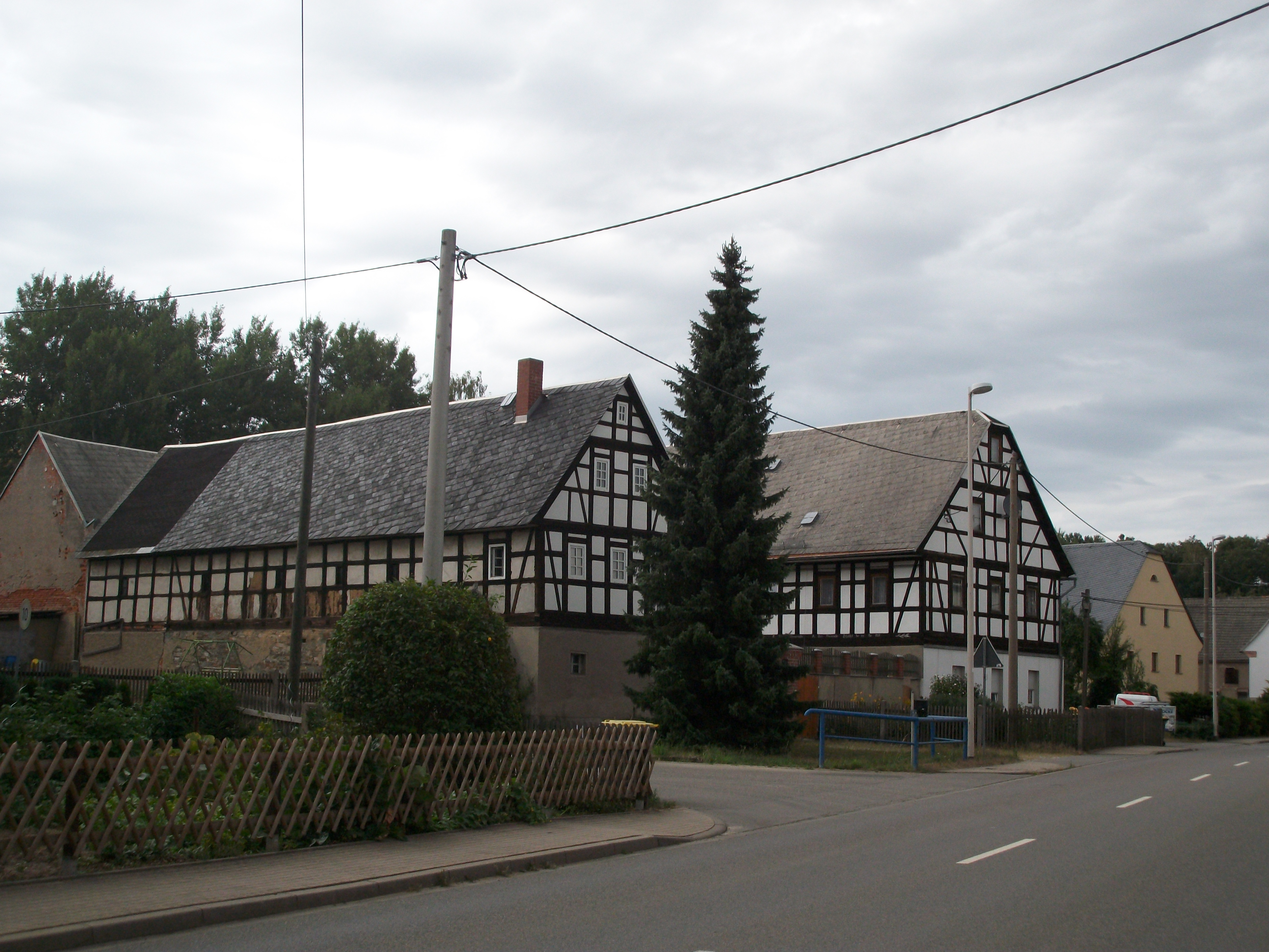 Kertzsch, Glauchauer Straße 17